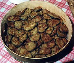 Mulagnano